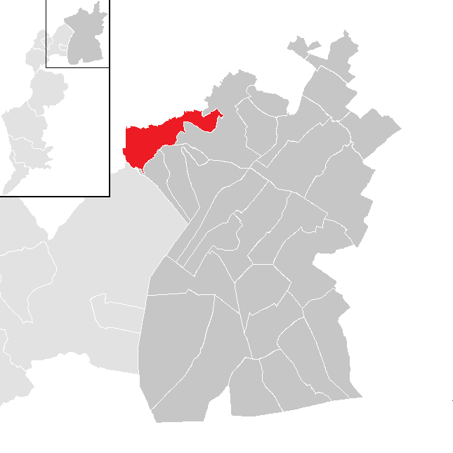 Bezirk Neudsiedl am See